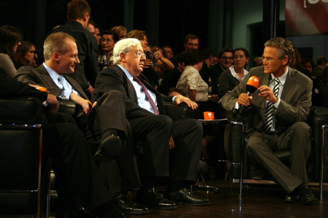 Der Journalist Peter Frey (ZDF) (rechts) im Interview. In der Nacht vom 4. auf den 5. November verfolgte ganz Deutschland gespannt, wie die Amerikaner in die Wahllokale gingen, um einen neuen Präsidenten zu wählen. Die Amerikanische Botschaft nahm als Mitveranstalter von zwei großen Events in Berlin an den Feierlichkeiten teil. Die erste Veranstaltung fand in der Hauptstadtrepräsentanz der Deutschen Telekom in Berlin statt und wurde gemeinsam vom ZDF, dem German Marshall Fund, der Deutschen Gesellschaft für Auswärtige Politik, der American Chamber of Commerce, dem Tagesspiegel, dem Internationalen Club im Auswärtigen Amt, dem Verband Berliner Kaufleute und Industrieller (VBKI) und der Deutschen Atlantischen Gesellschaft organisiert. Zum Programm zählten Podiumsdiskussionen von Wahlexperten, Live-Musik und fortlaufende Nachrichten-Updates ergänzt von den Bewertungen deutscher Experten für amerikanische Politik.